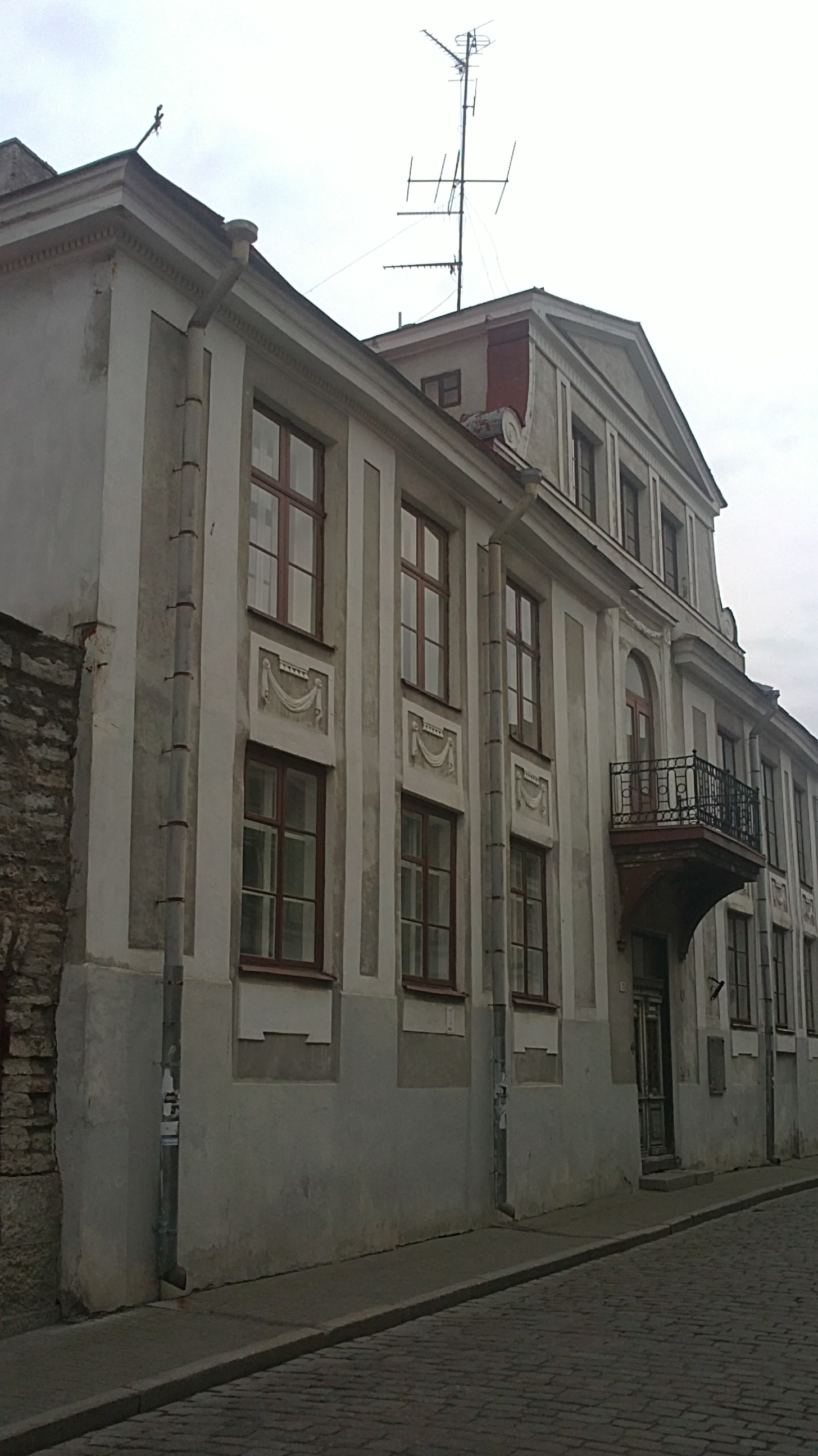 Tallinna vanalinnas, Uus tänav 10 asuv hoone